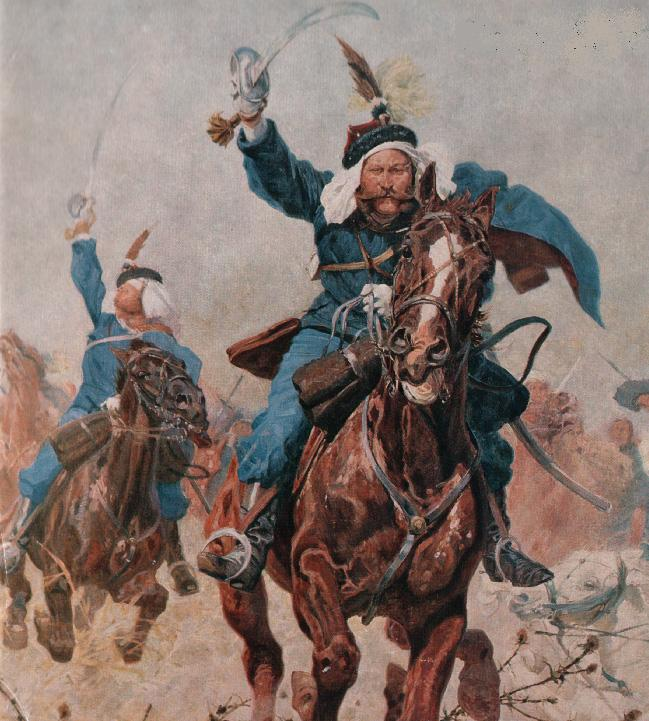 Angriff des k.k. Ulanen-Regiments Nr. 13 in der Schlacht von Custozza 1866title QS:P1476,de:"Angriff des k.k. Ulanen-Regiments Nr. 13 in der Schlacht von Custozza 1866" label QS:Lde,"Angriff des k.k. Ulanen-Regiments Nr. 13 in der Schlacht von Custozza 1866"